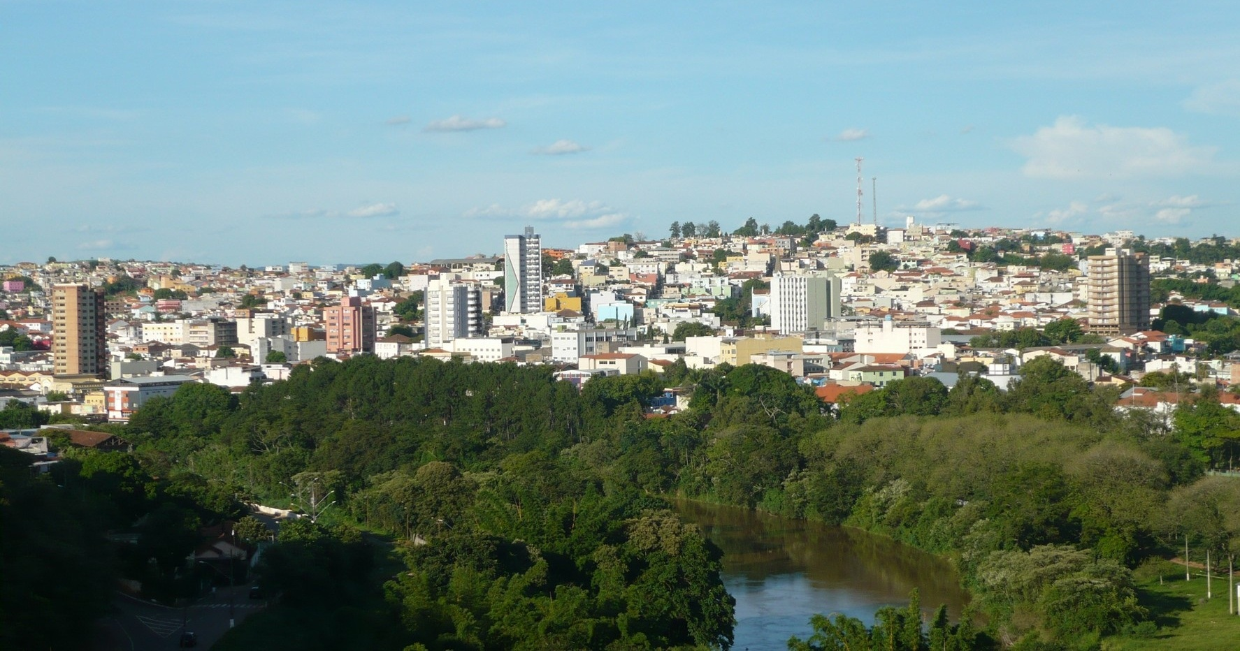 Foto panorâmica do Centro de Três Corações